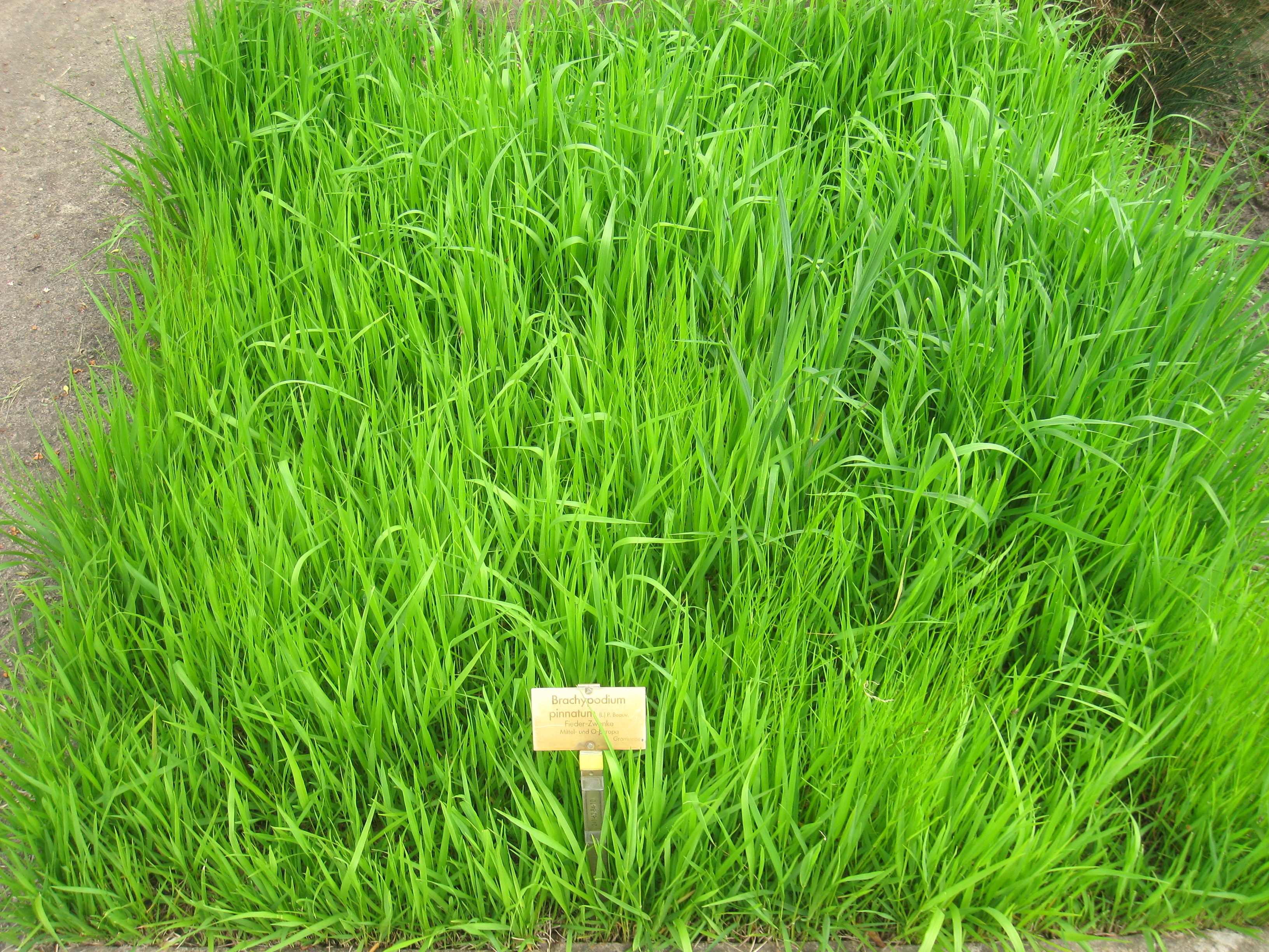 Brachypodium pinnatum specimen in the Botanischer Garten, Berlin-Dahlem (Berlin Botanical Garden), Berlin, Germany.